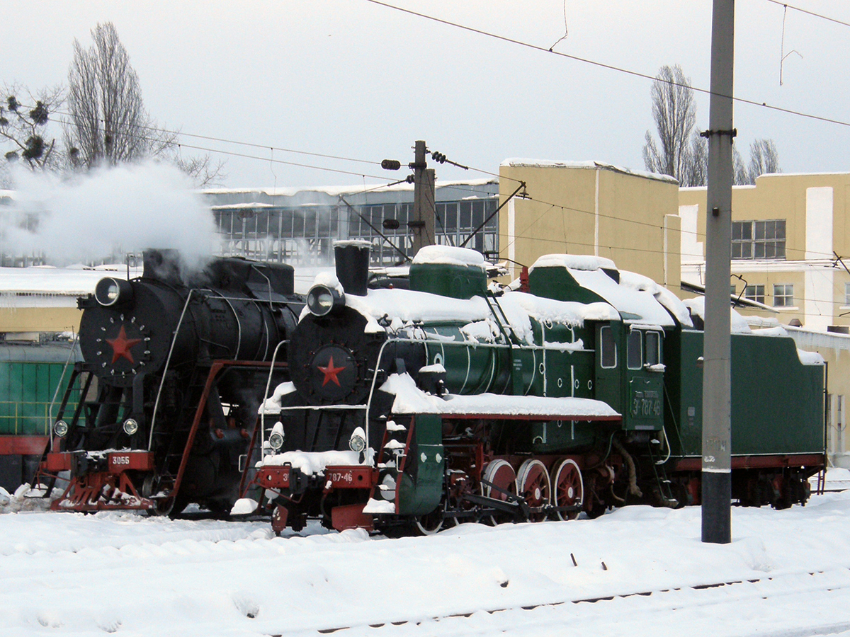 за ним паровоз Л-3055